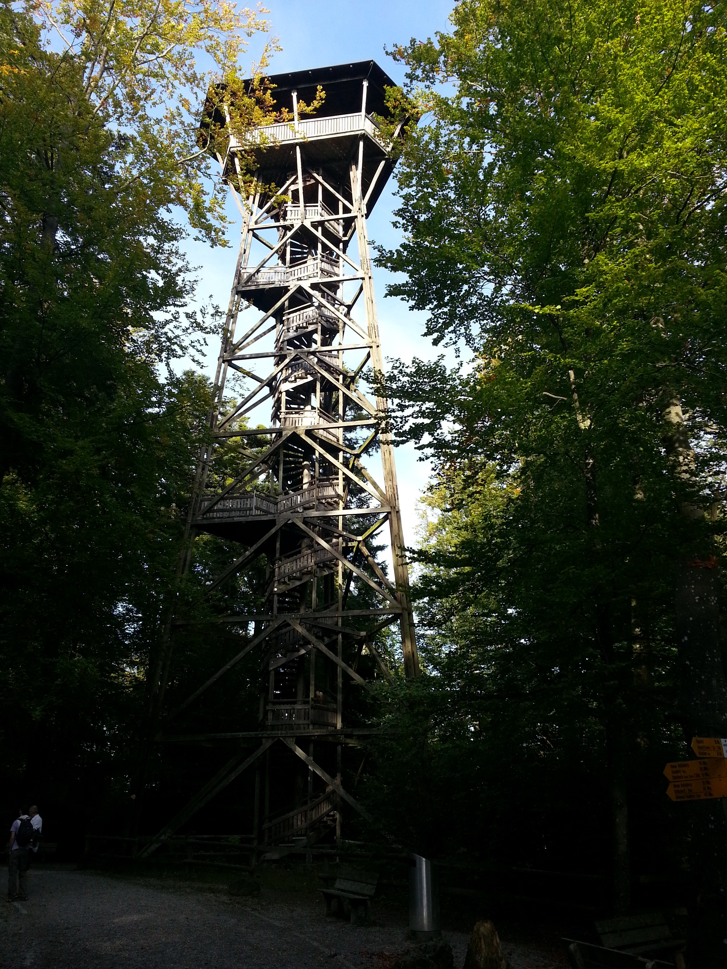 Aussichtsturm Lorenkopf